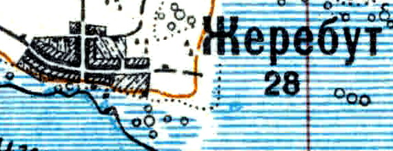 Топографическая карта Ленинградской области, квадрат Vc-29 (Батецкая), деревня Жеребут